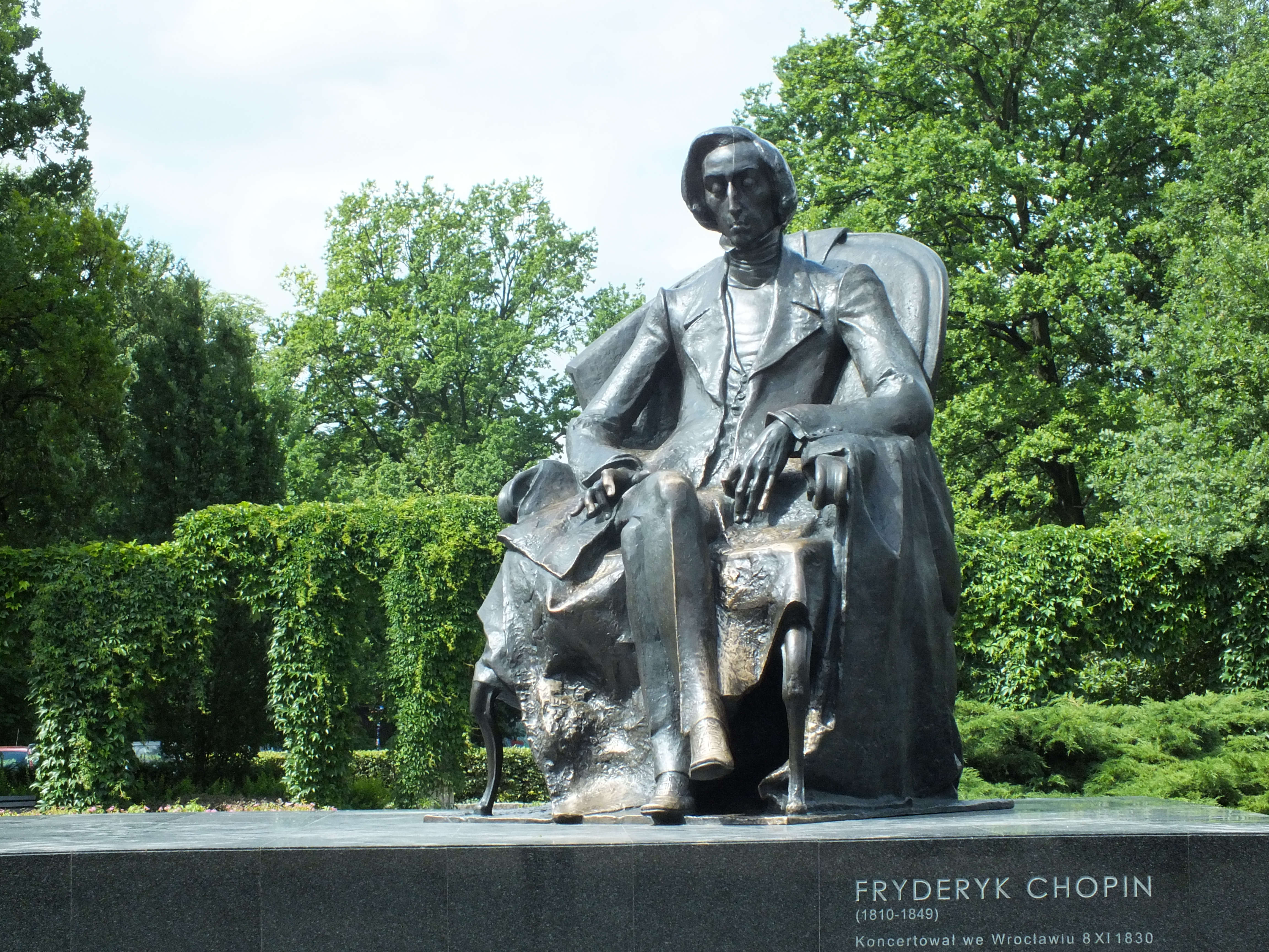 Pomnik Fryderyka Chopina w Parku Południowym we Wrocławiu